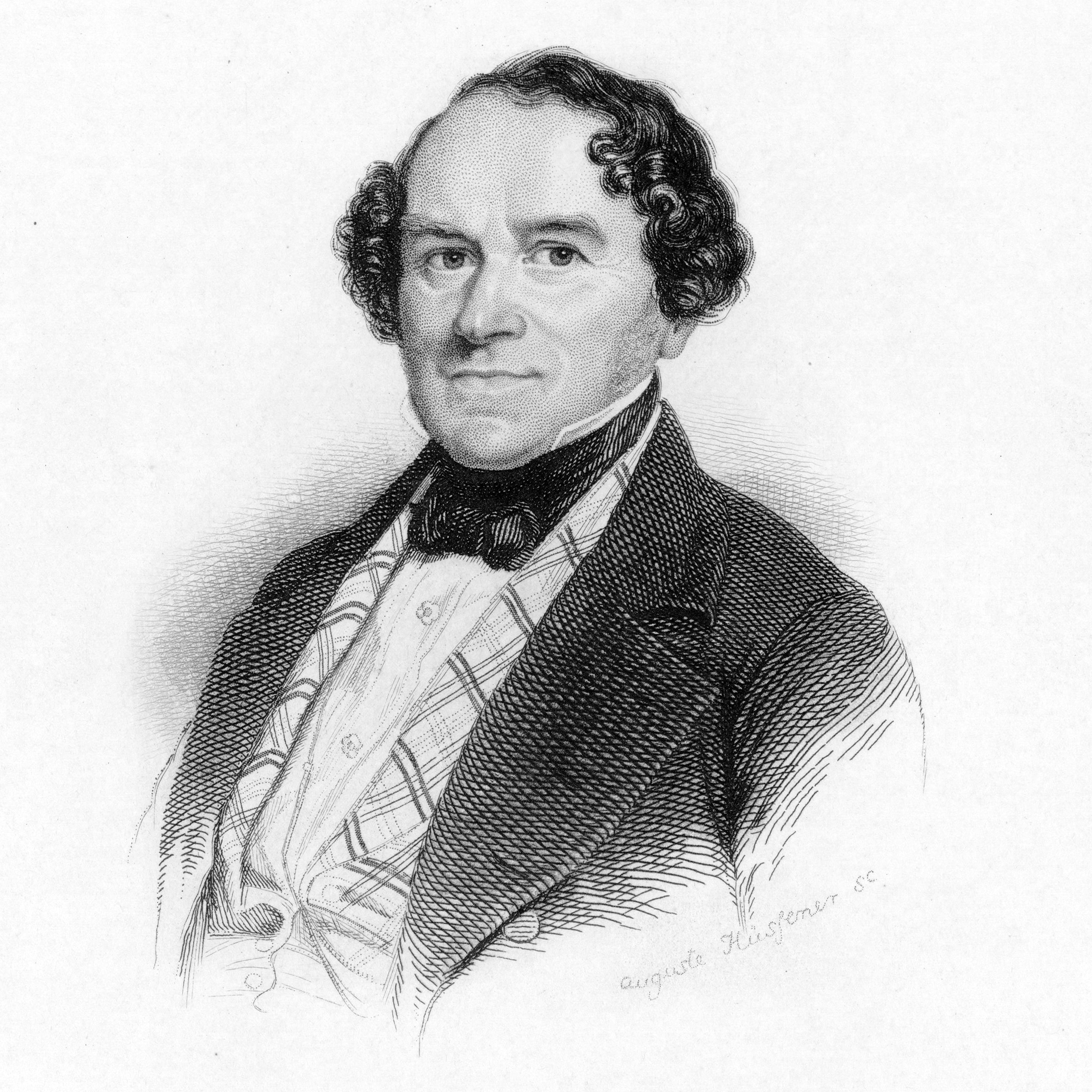 Depicted person: Conradin Kreutzer